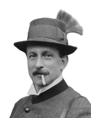 Portrait von Felix Salten mit Hut und Gamsbart